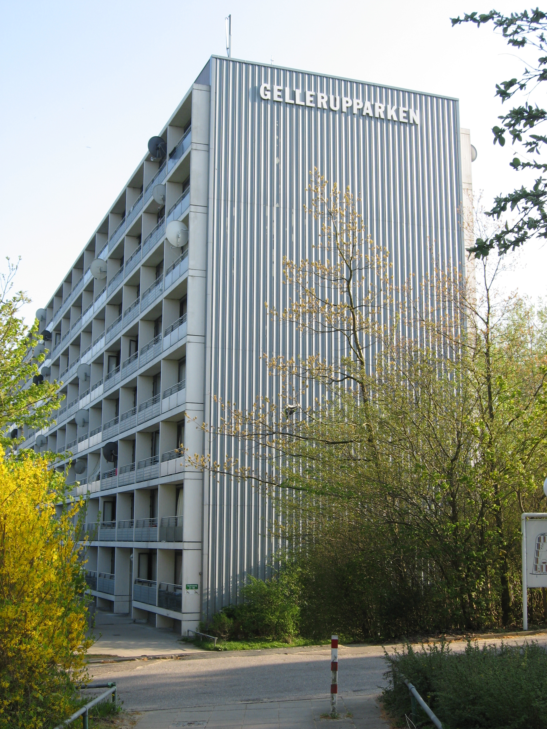 Gellerupparken in Århus, Denmark.